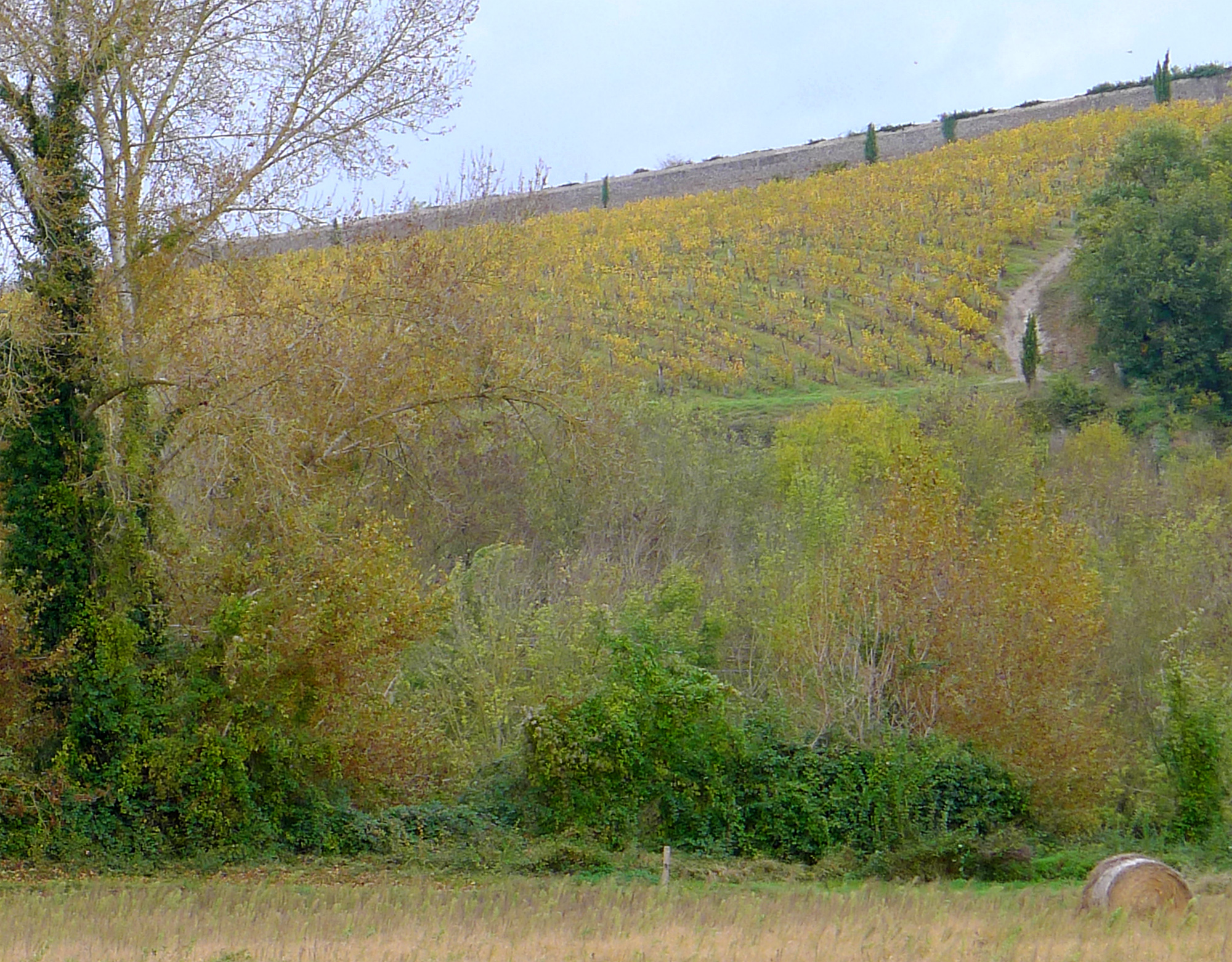 Coteaux vinicoles de Savennières vus depuis l'île Béhuard - Maine et Loire (France)